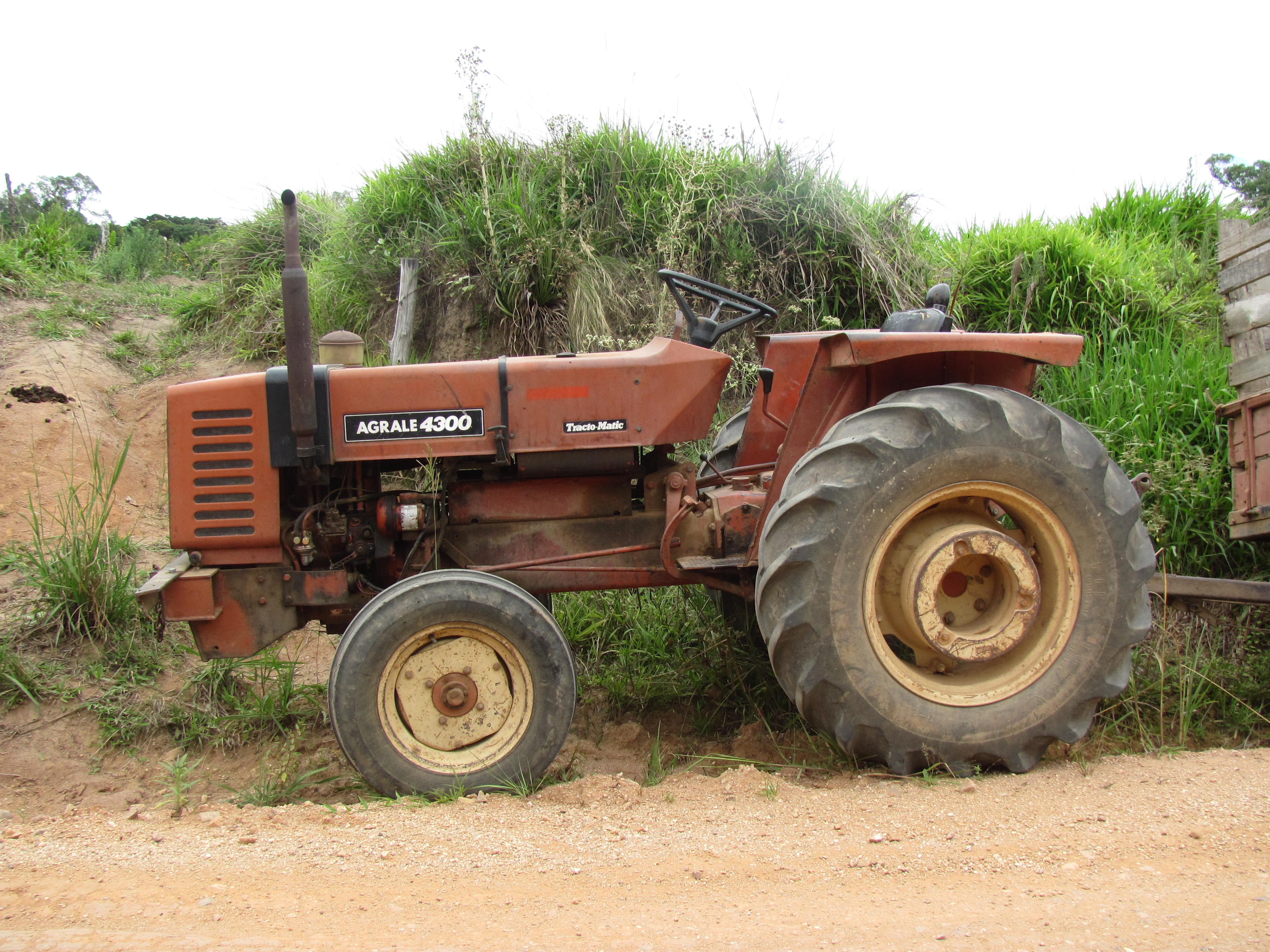 Agrale 4300 trator em Mariana Pimentel